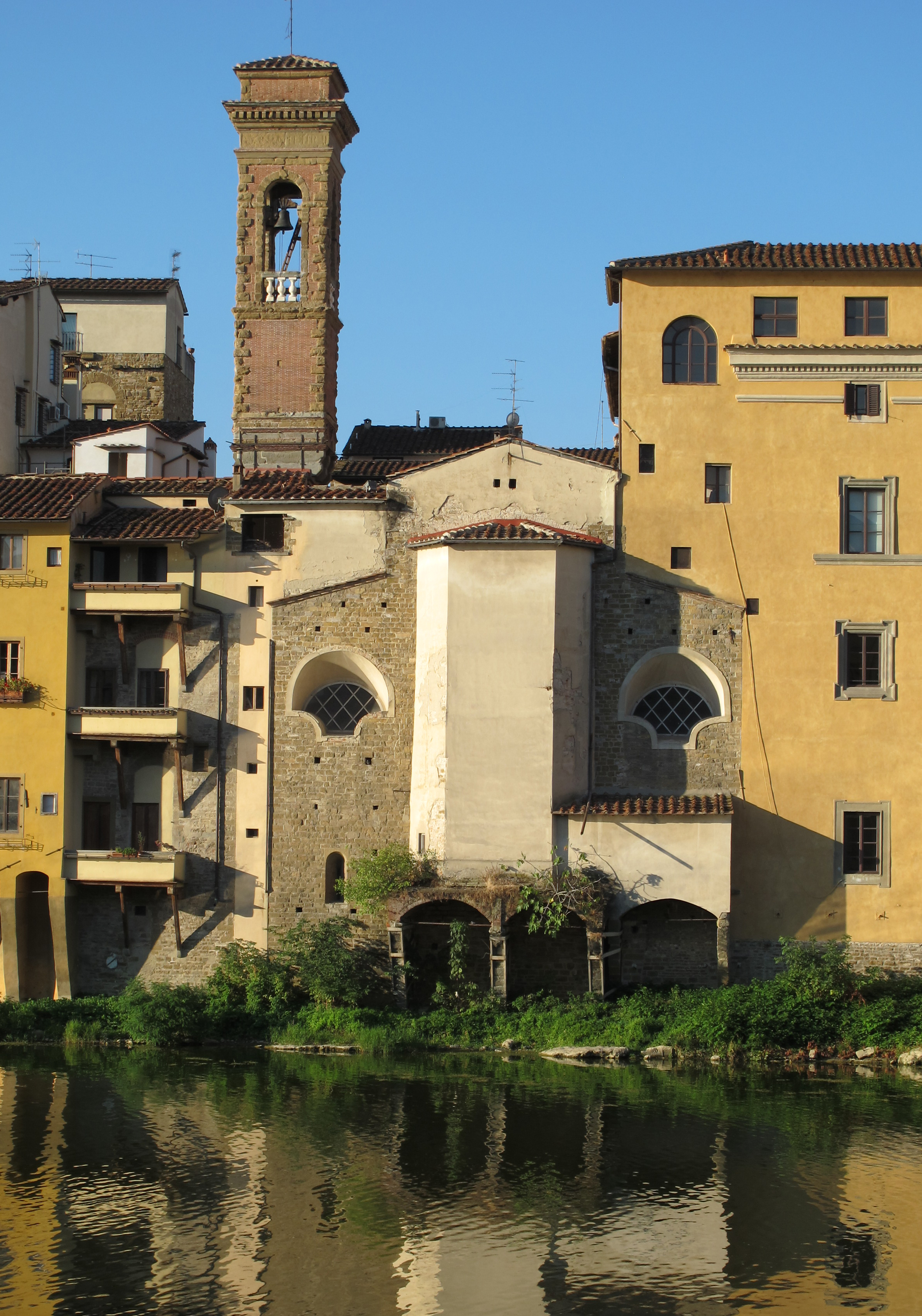 Borgo San Jacopo, Firenze